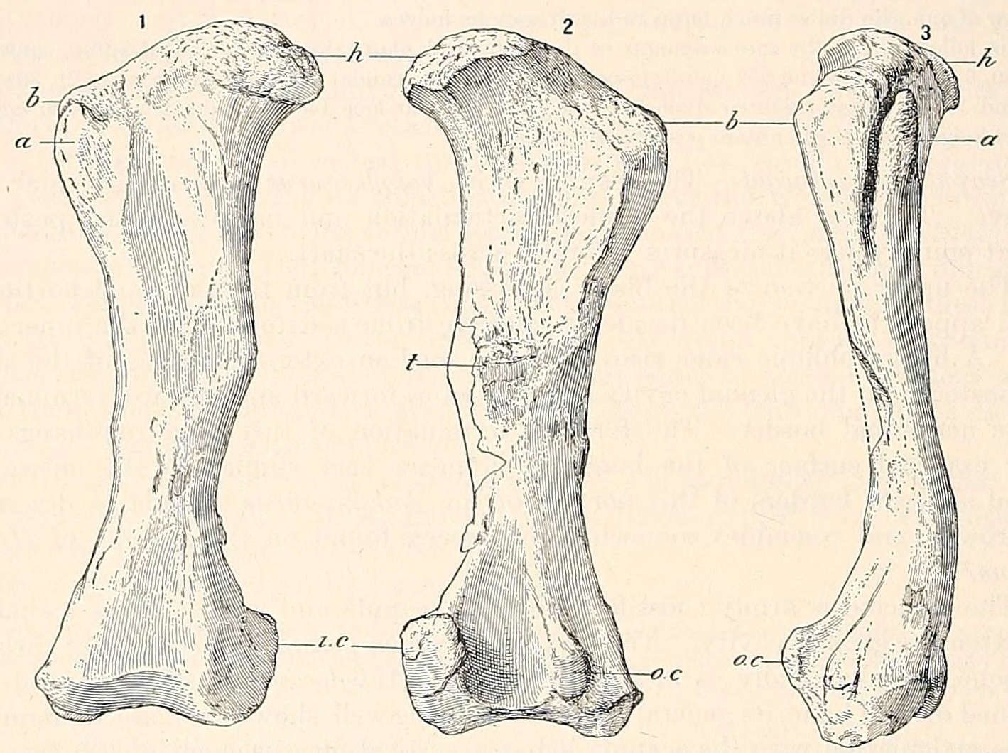 Hoplitosaurus femur.